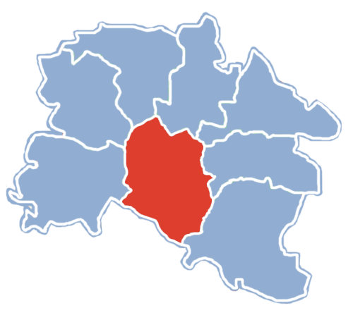 Położenie gminy Pajęczno na mapie powiatu pajęczańskiego.